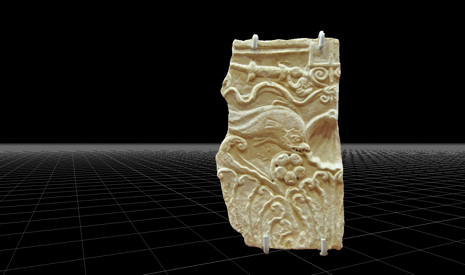 modello 3d delfino e geco parasta